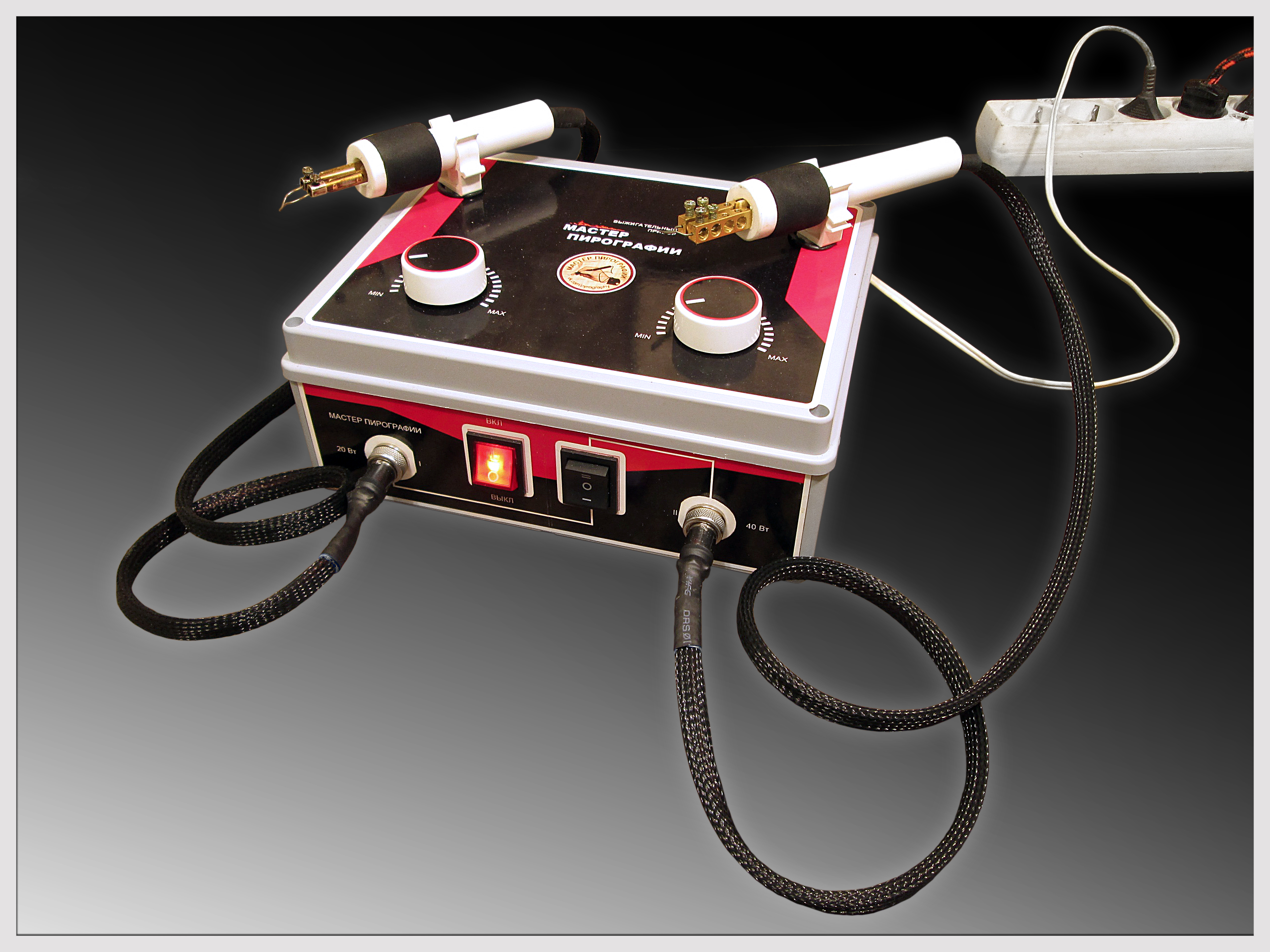 Пирограф - прибор для выжигания.